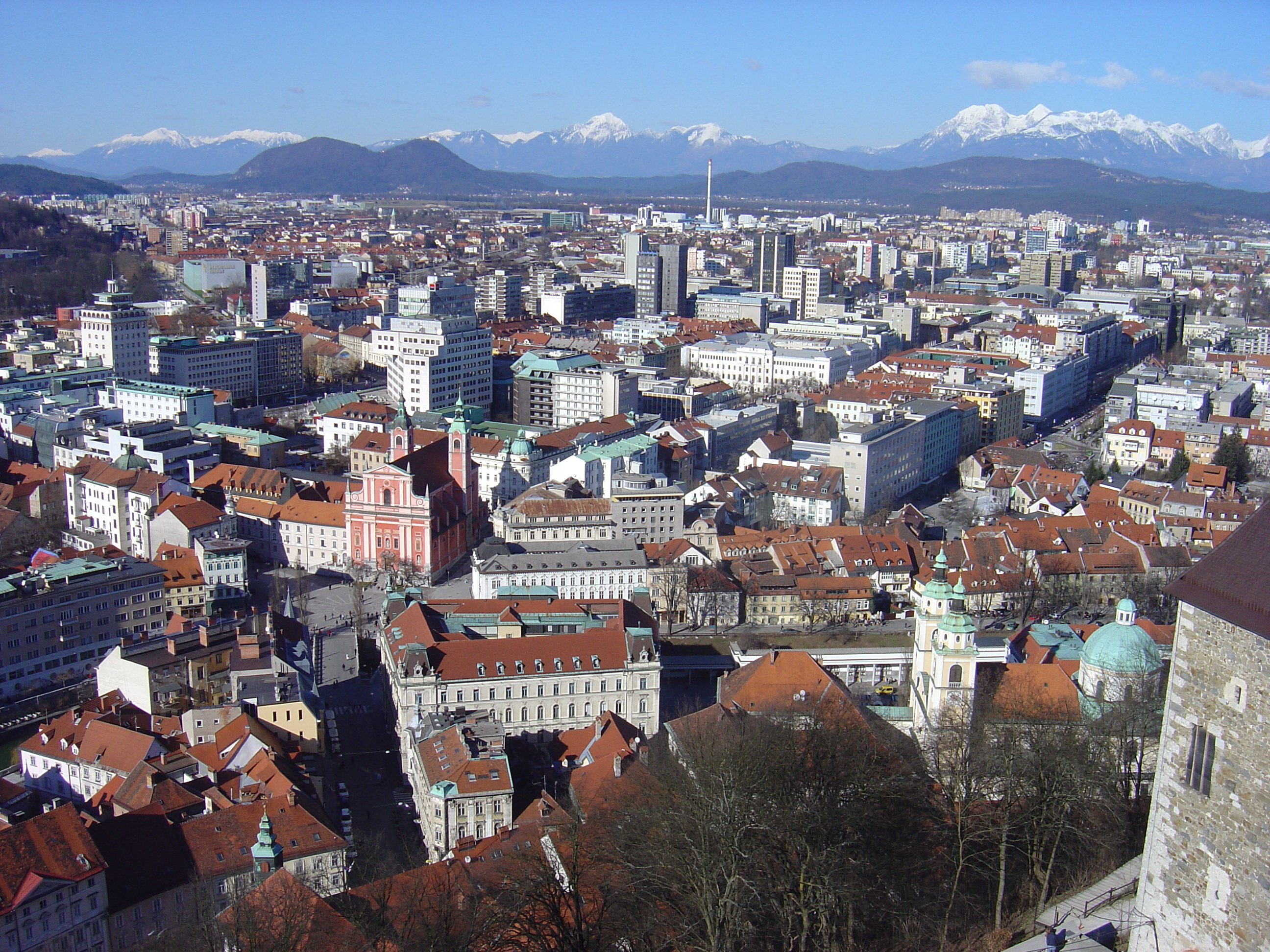 Ljubljana, Slovenia